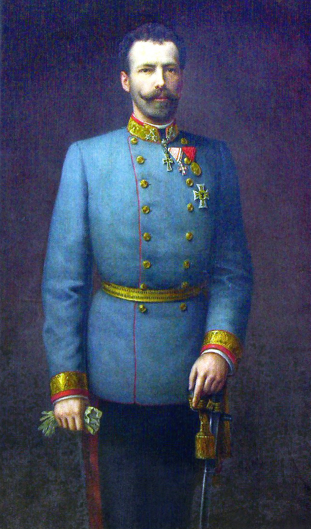 Porträt Erzherzog Eugen in Generalsuniform. Geschenk von Meran für die Erhebung der Stadt zum Garnisonsort.